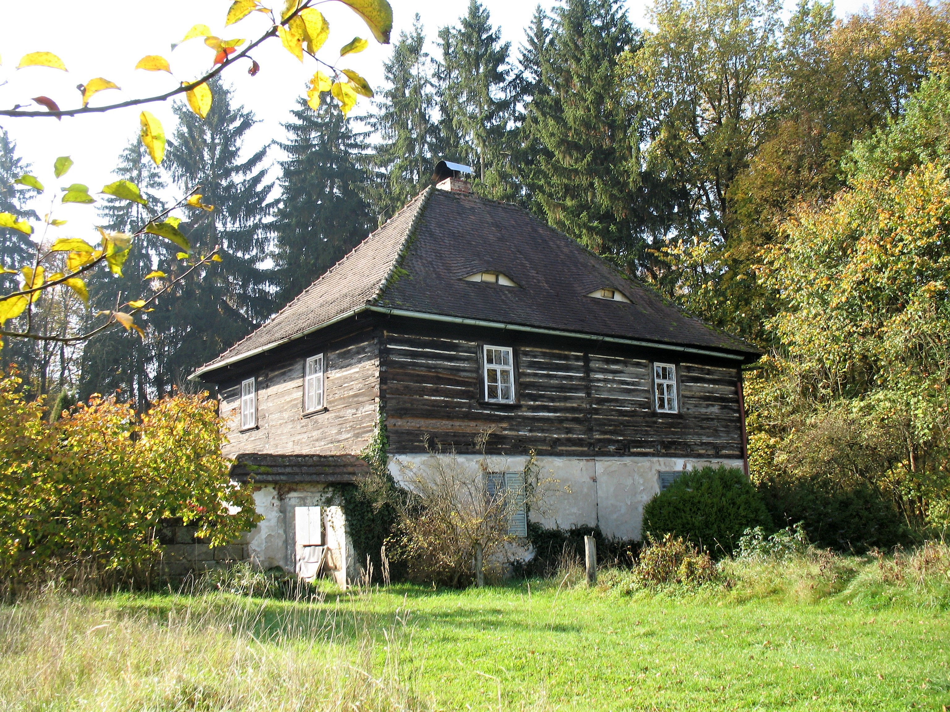 Historická bažantnice na katastru městyse Holany u obce Zahrádky na Českolipsku. Roubený dům na severním okraji bažantnice